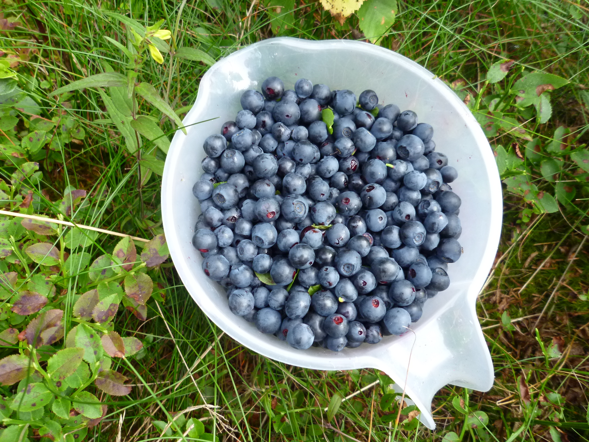 Gefäß mit gepflückten Heidelbeeren (Vaccinium myrtillus) im Wald bei Sankt Englmar im Juli 2015.